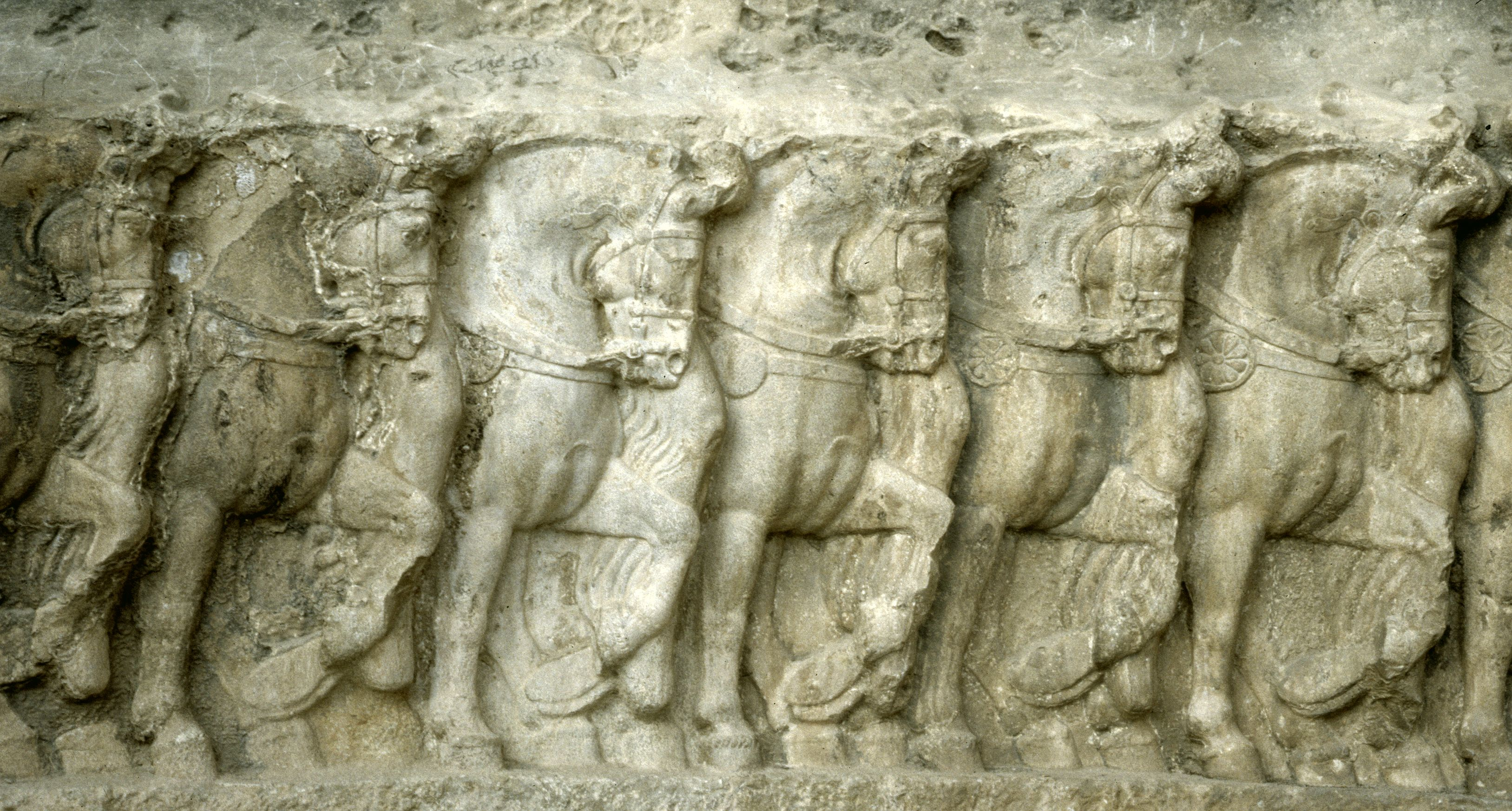 Bishapur: Shapurs I. dreifacher Sieg (Detail)